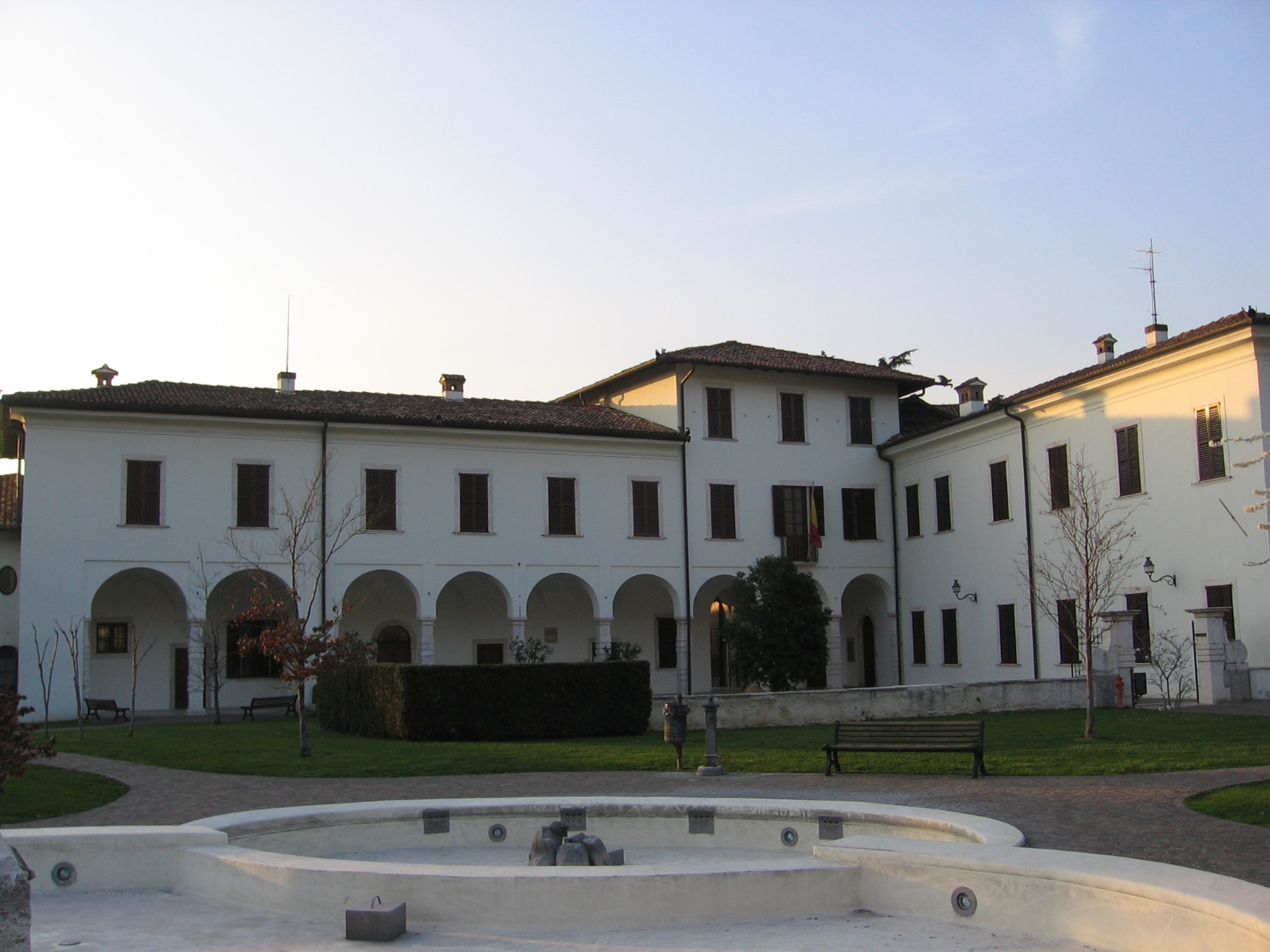 Villa di Serio, Bergamo, Italia